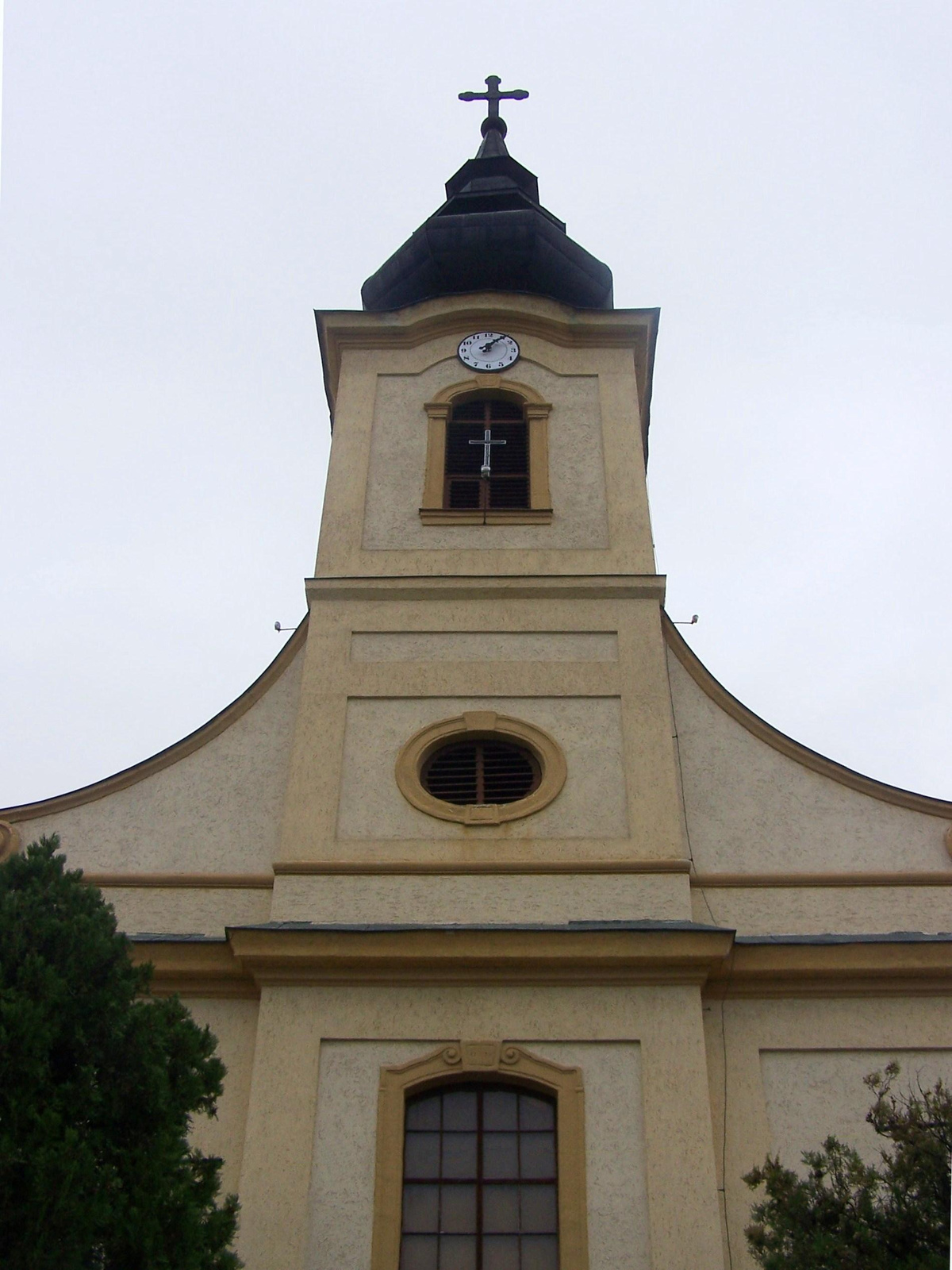 Szentháromság római katolikus templom (Csömör, Szabadság út 20--4.) This is a photo of a monument in Hungary. Identifier: 6954